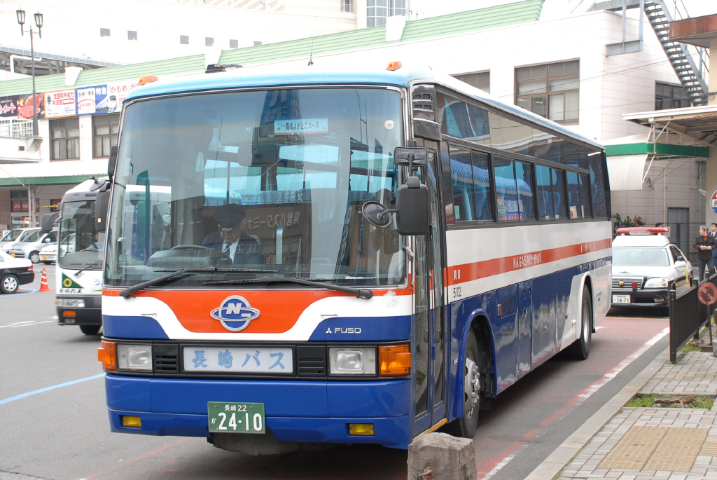 2010年1月 長崎駅前にて撮影